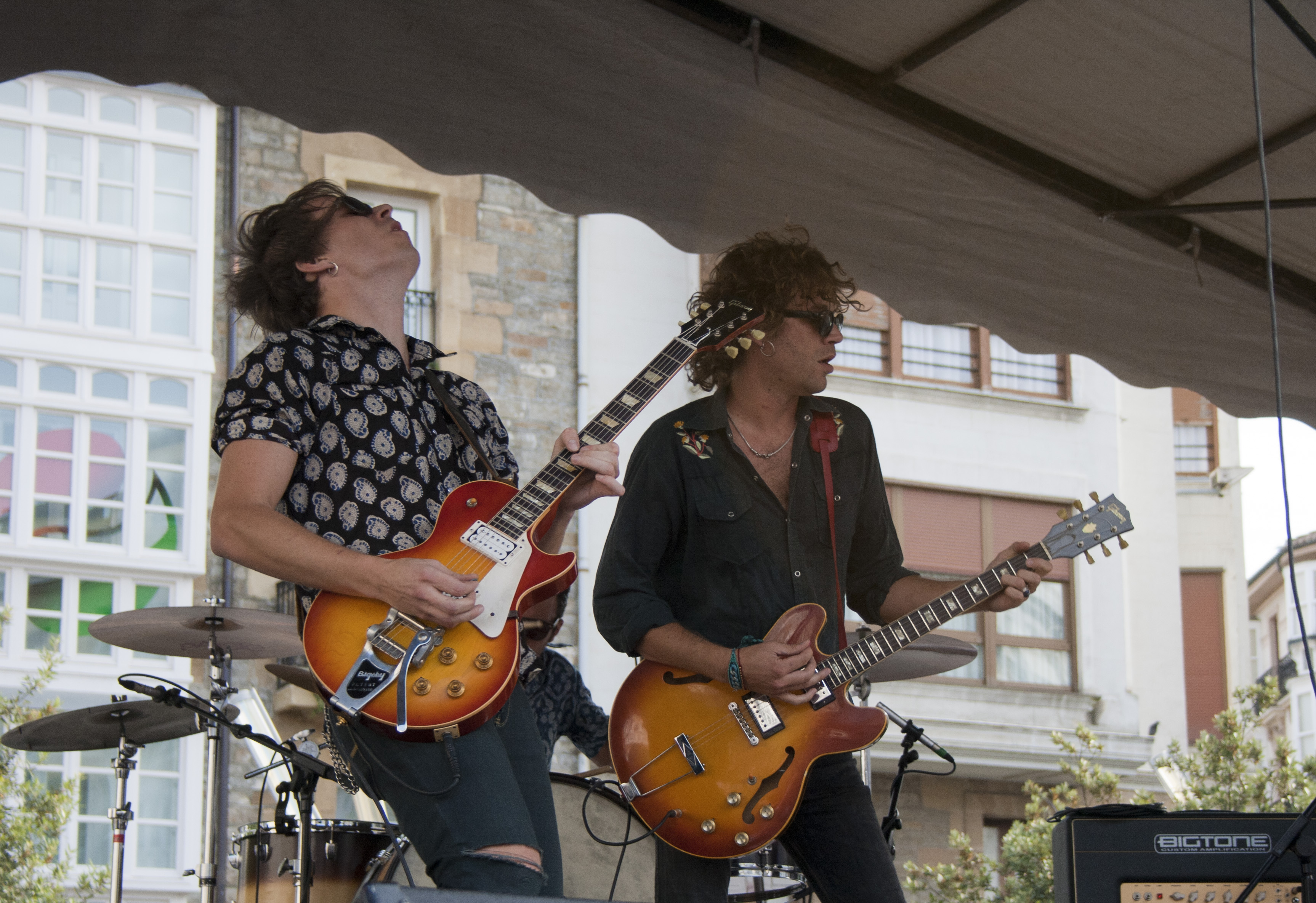 Los Zigarros (Osteguna Rock 2014).